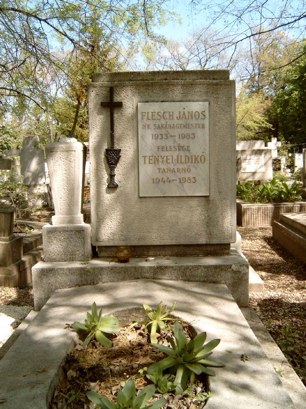 Flesch János (Budapest, 1933. szeptember 30. – Whitestable, Anglia 1983. december 9.) sakkozó, szakíró sírja Budapesten. Új köztemető: 49/VIII-1-59